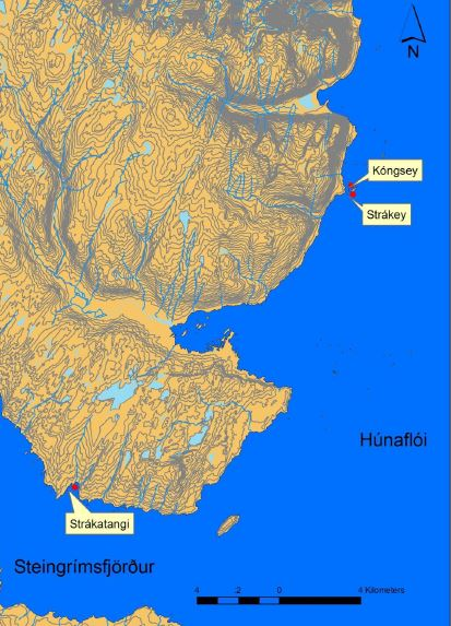 Kort af þekktum hvalveiðistöðum erlenda manna á Íslandi á 17.öld